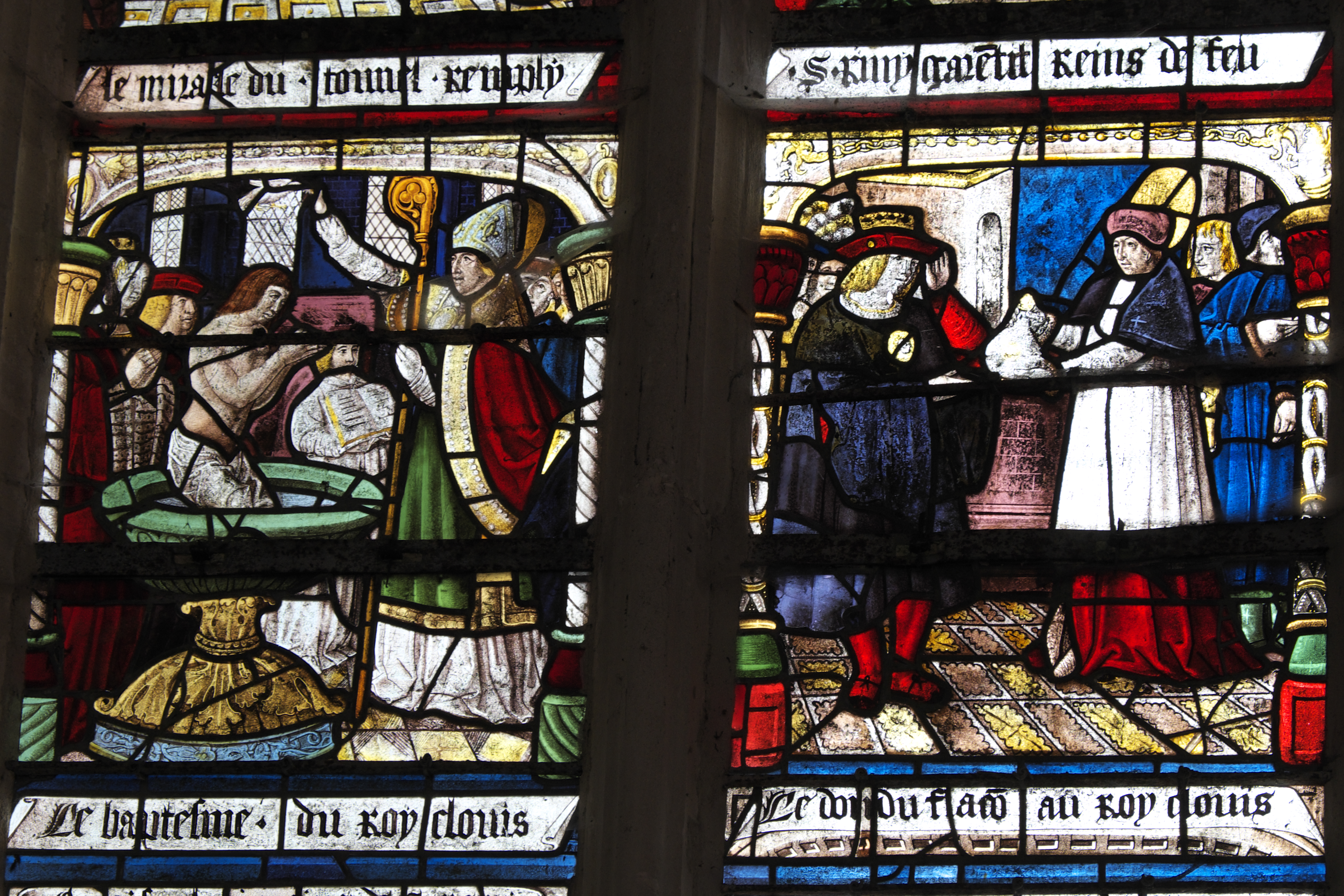 Katholische Kirche Saint-Remi in Ceffonds im Département Haute-Marne (Champagne-Ardenne/Frankreich), Bleiglasfenster (baie 03), um 1510; Darstellung: Hl. Remigius, Taufe Chlodwigs (Ausschnitt) .